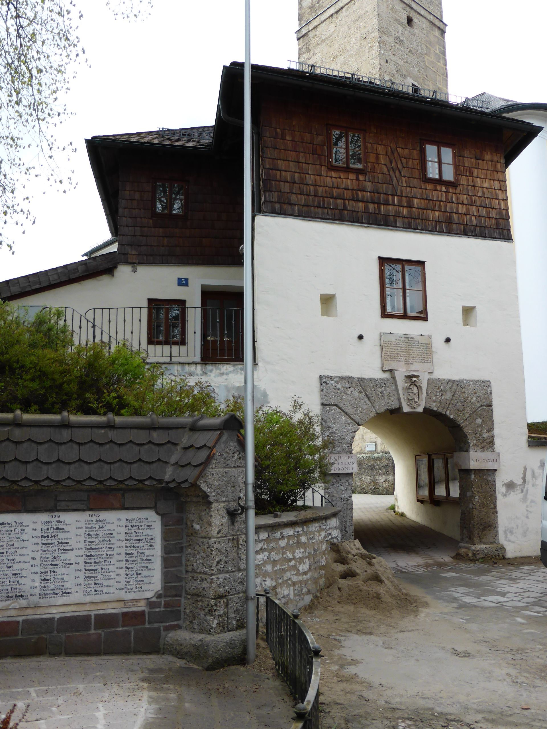 Schanze und Wachthaus